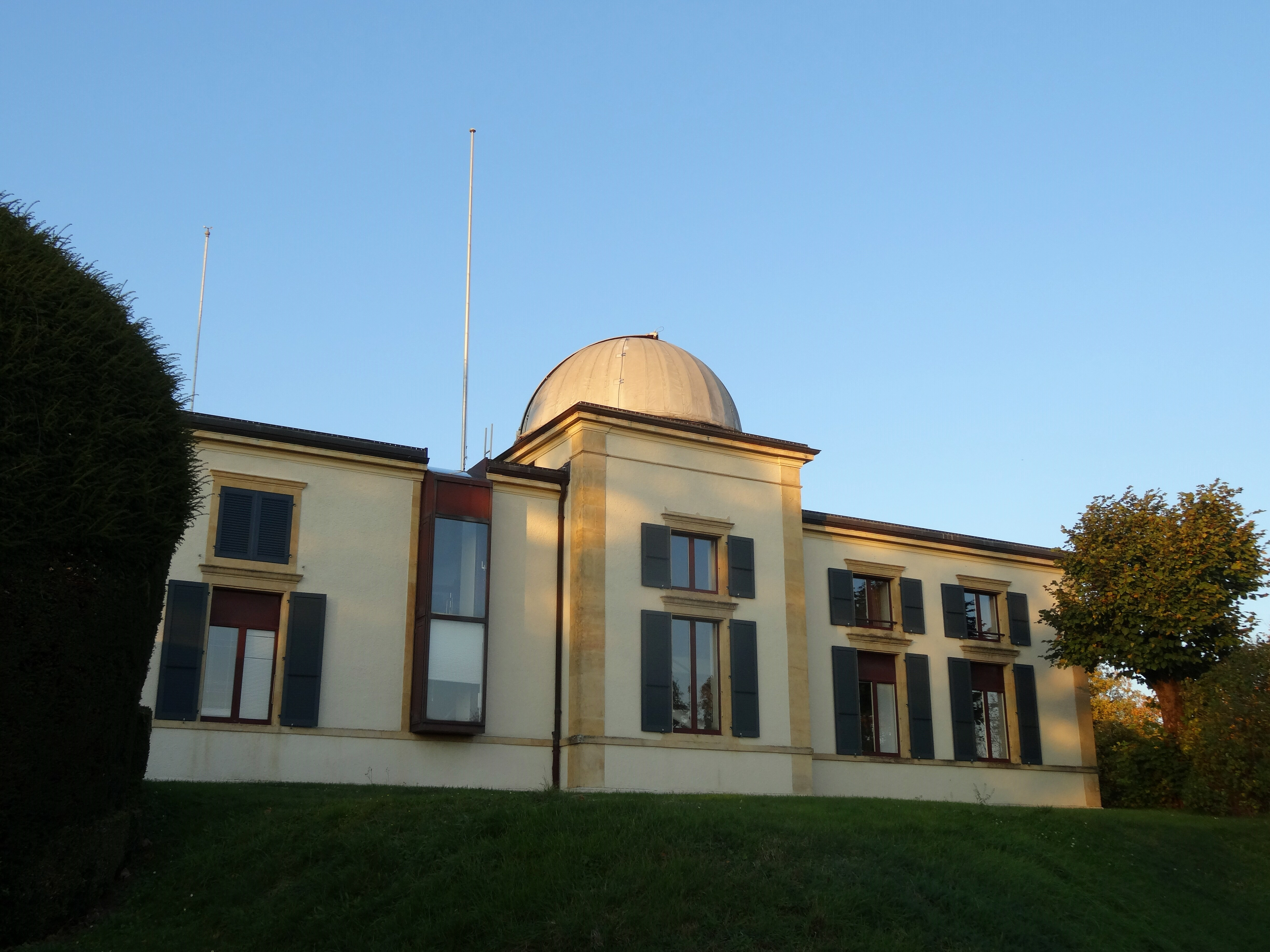 Neuchâtel, L'Observatoire, La Méridienne (premier bâtiment de l'Observatoire, qui accueillait la lunette méridienne). Mots-matères: Neuchâtel, Observatoire, Méridienne.